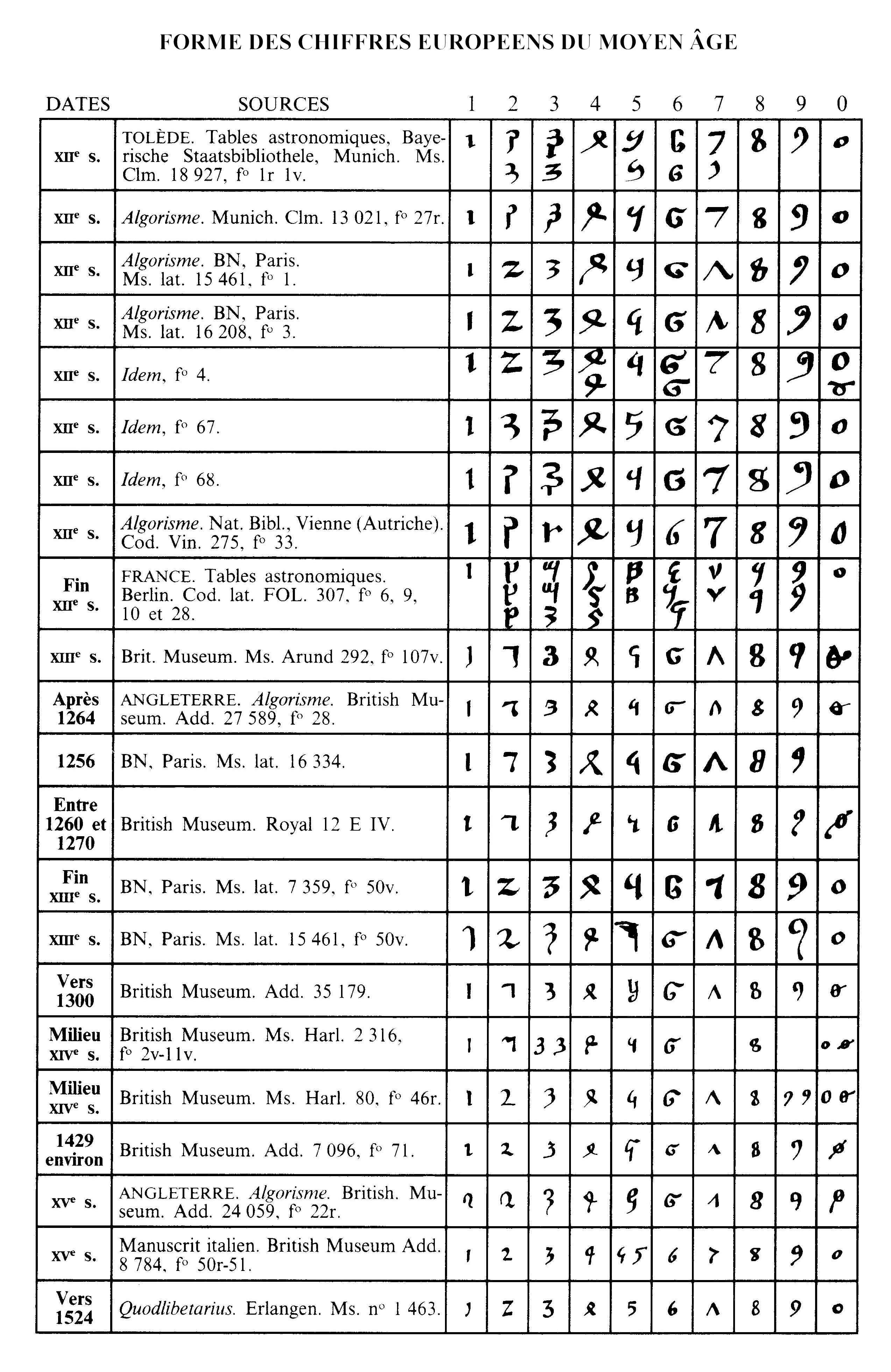 Forme des chiffres arabes du Moyen Âge.